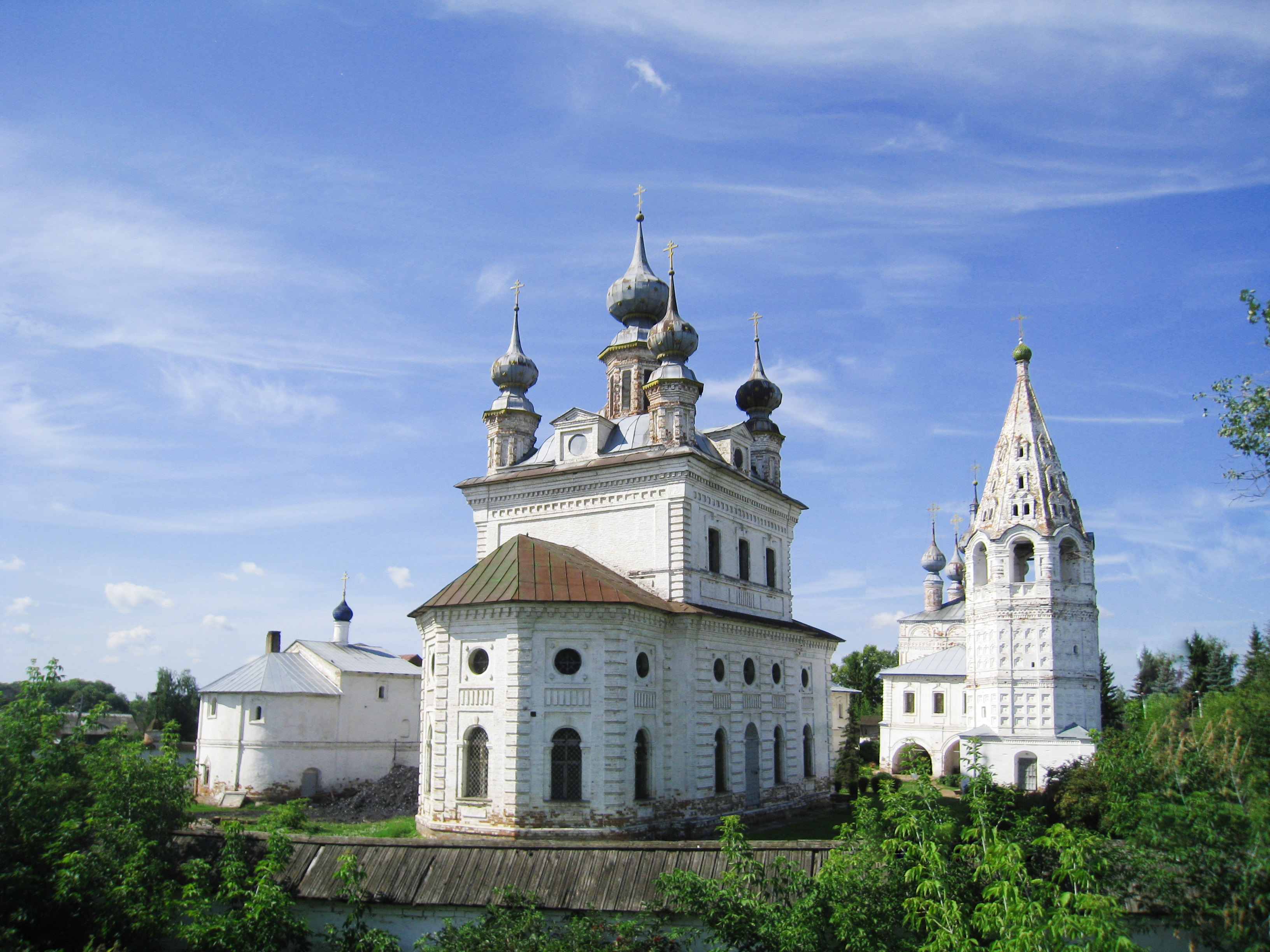 Ансамбль Михаило-Архангельского монастыря: улица 1 Мая, Юрьев-Польский, Юрьев-Польский район, Владимирская область